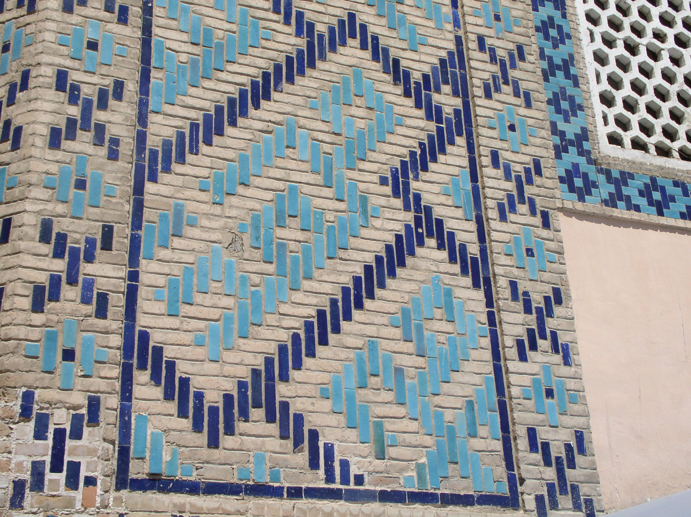 Guri Amir brick ornament, Samarqand, Uzbekistan